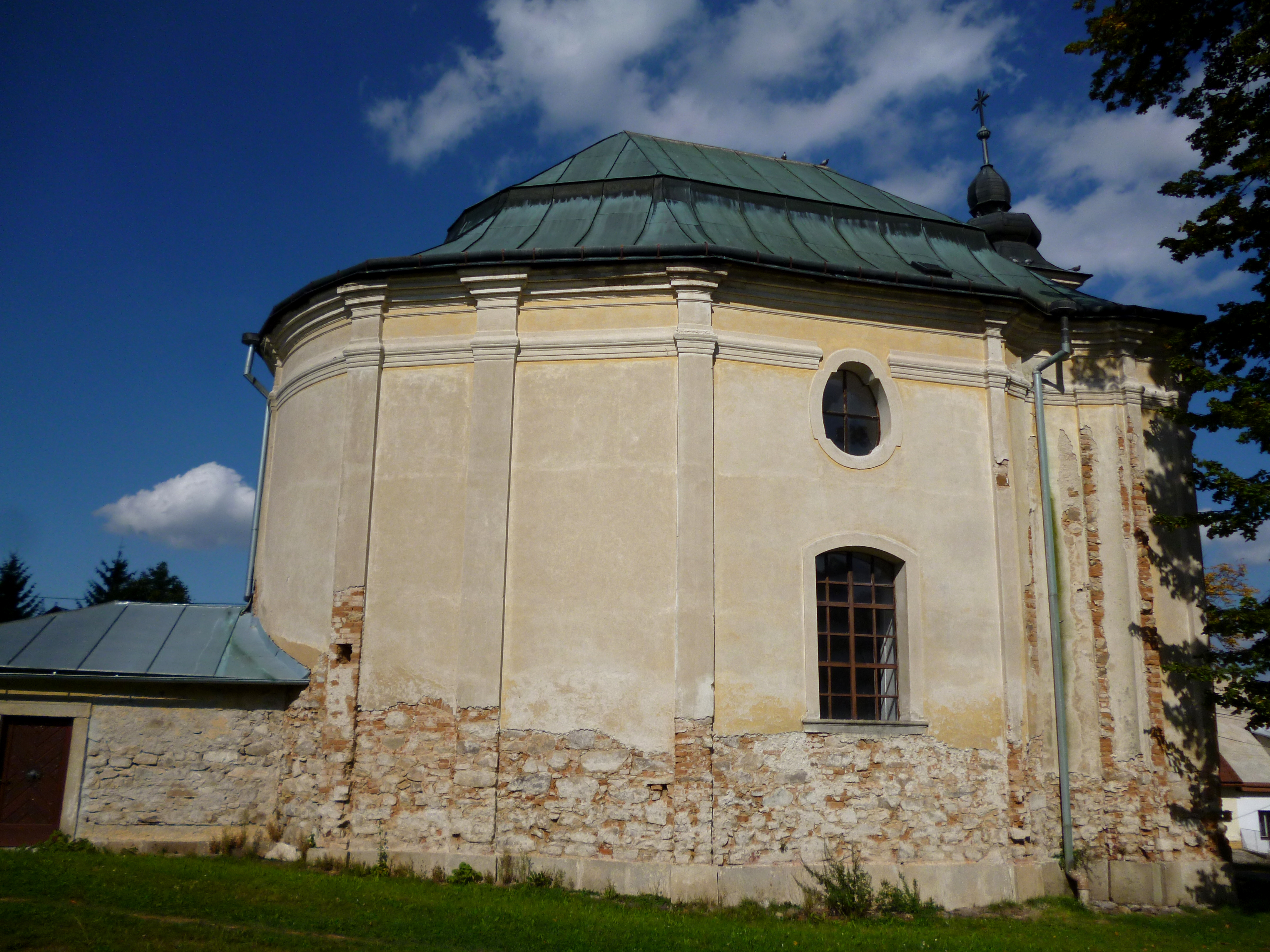 Mirošov - Kostel sv. Josefa